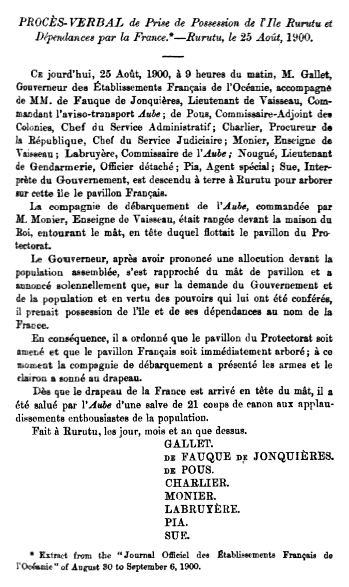 Procès-verbal de Prise de Possession de l'Ile Rurutu et Dépendances par la France.